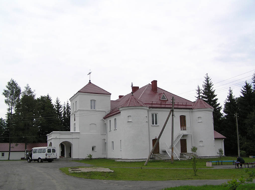 Гайтюнишский дом-замок